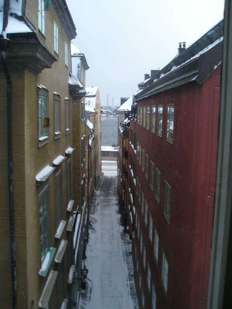 A photo of Johannesgränd in Gamla stan, Stockholm.